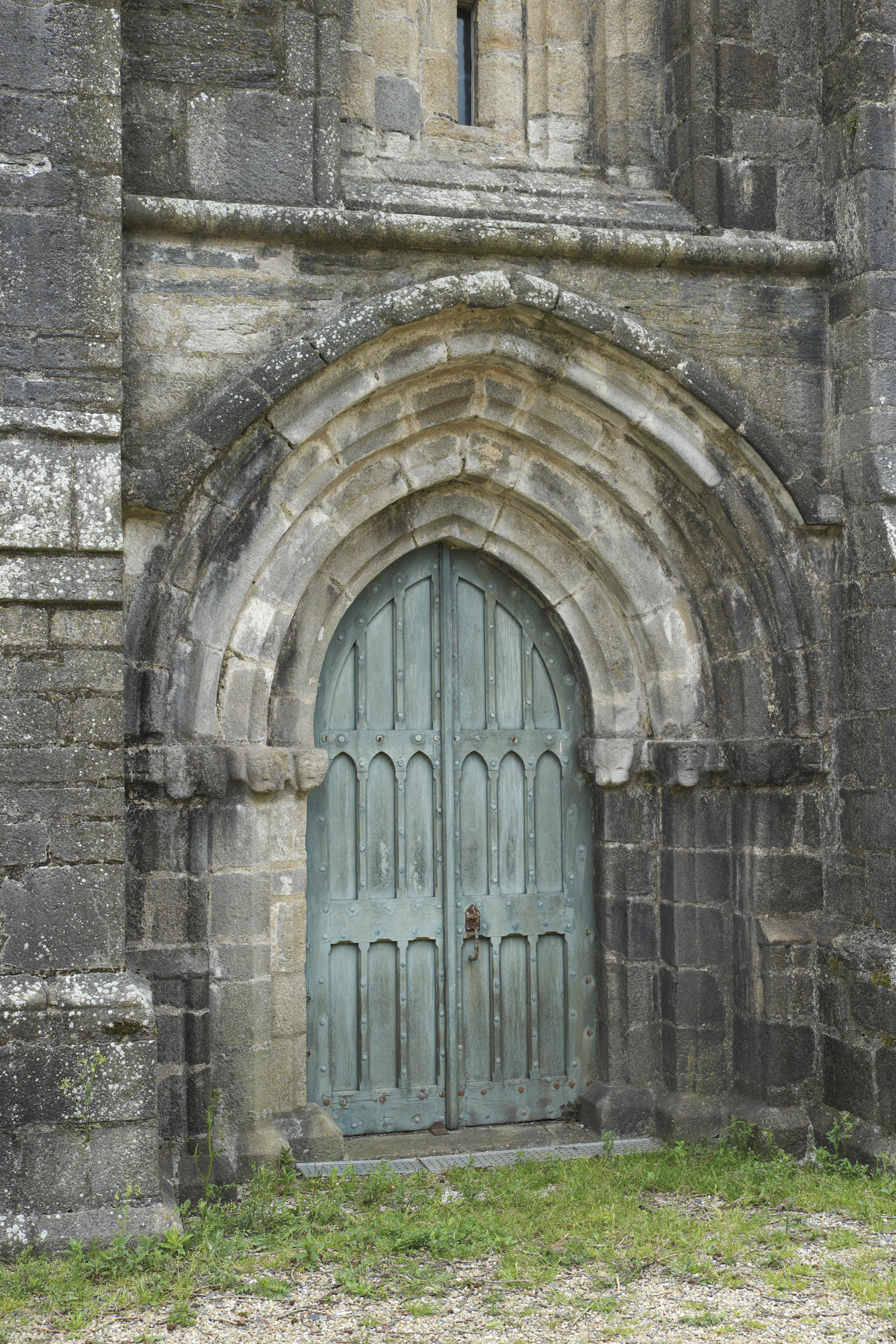 Katholische Pfarrkirche Saint-Salomon in La Martyre im Département Finistère (Region Bretagne/Frankreich), Portal an der Westfassade